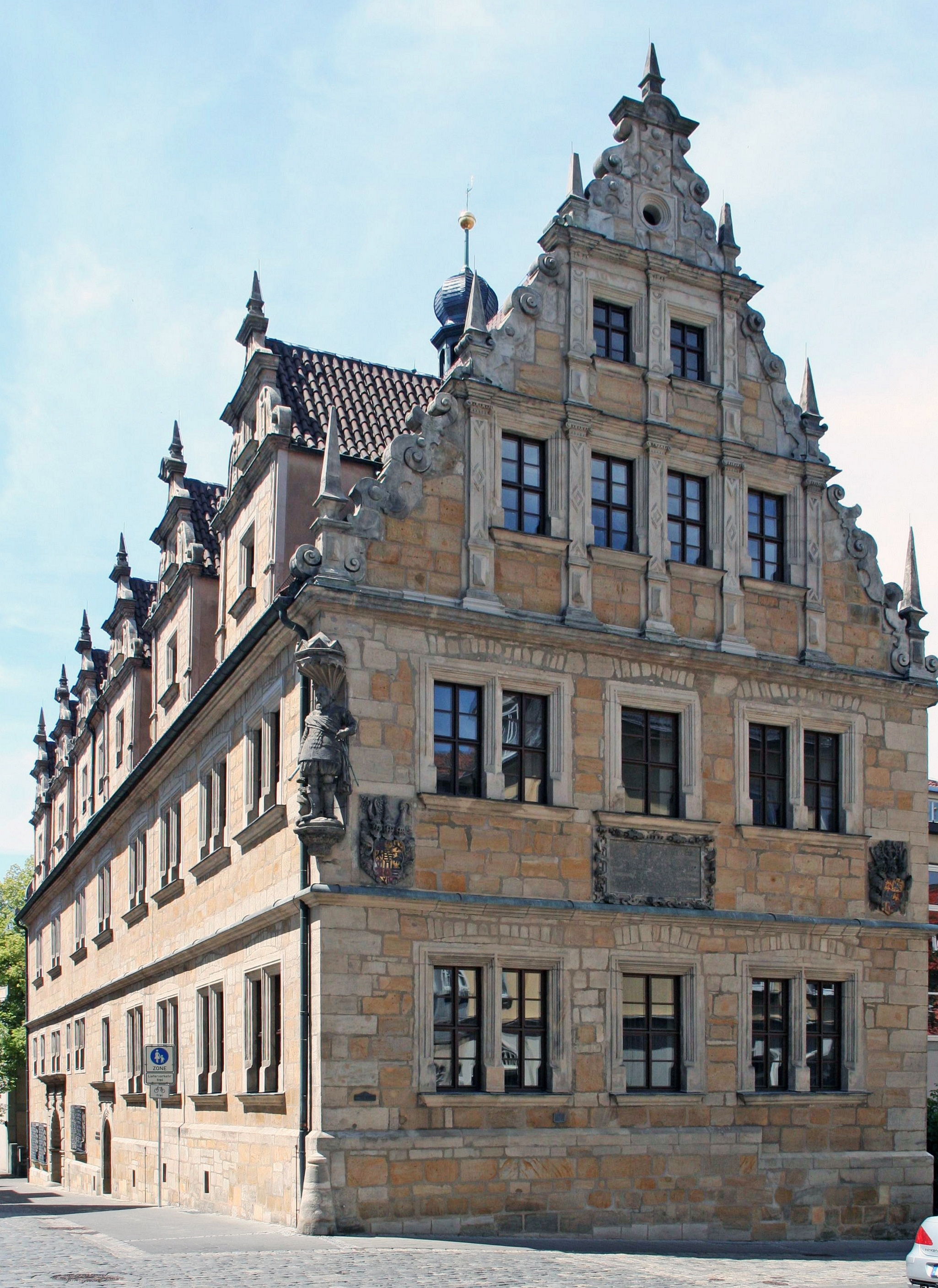 Gymnasium Casimirianum, Gymnasiumsgasse 2 Coburg